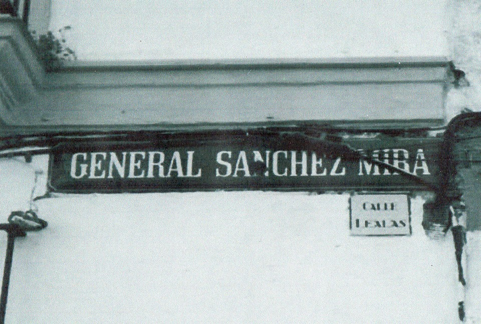 RotuloCalleSanchezMira